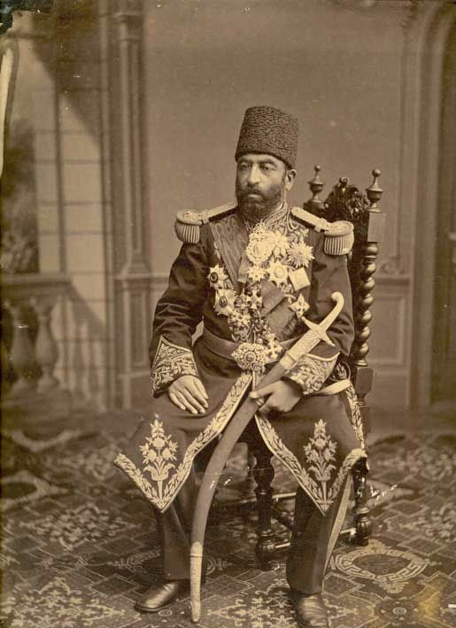 آقا ابراهیم امین‌السلطان، از رجال دوره قاجار